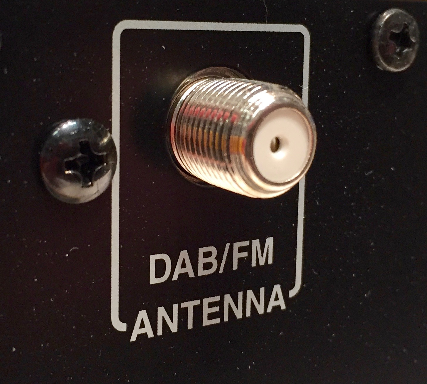 Antenne inngang for montering av ekstern antenne på DAB Radio.